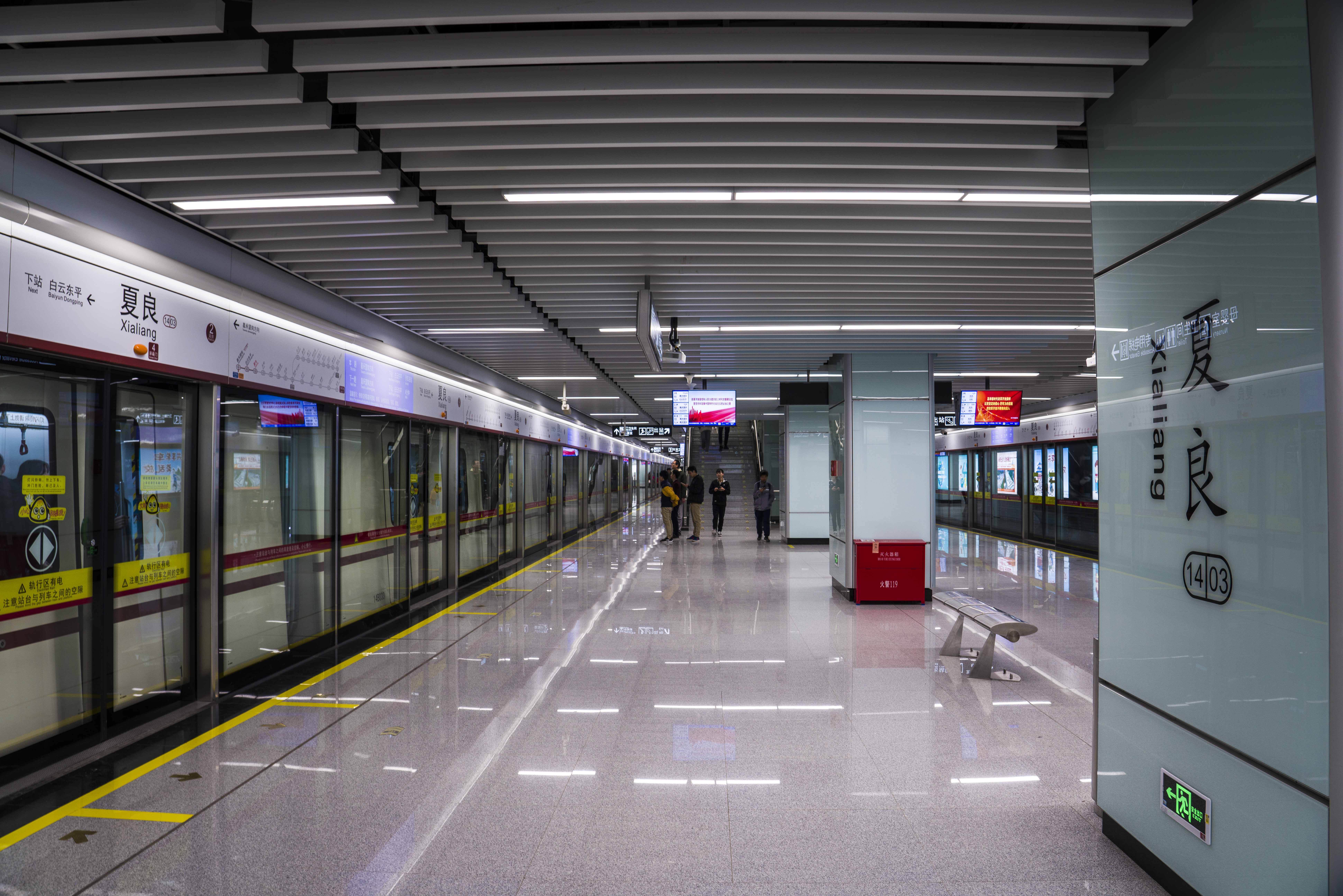 夏良站2号月台